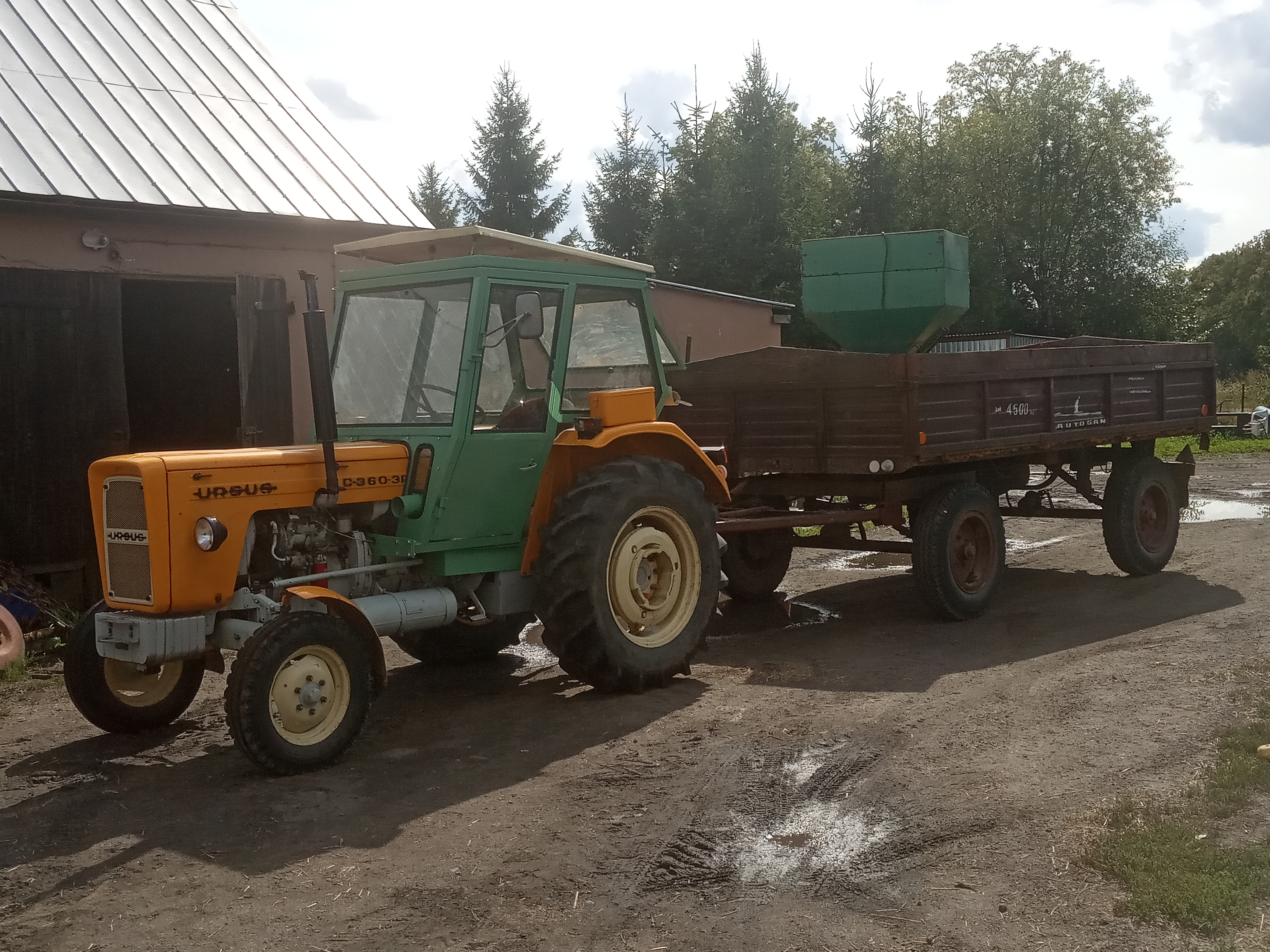 Widok na prawą stronę ciągnika. Ciągnik z grudnia 1984r